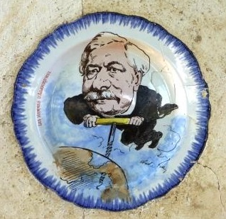 Caricature de Ferdinand de Lesseps par André GILL, lors des travaux du canal de Panama.